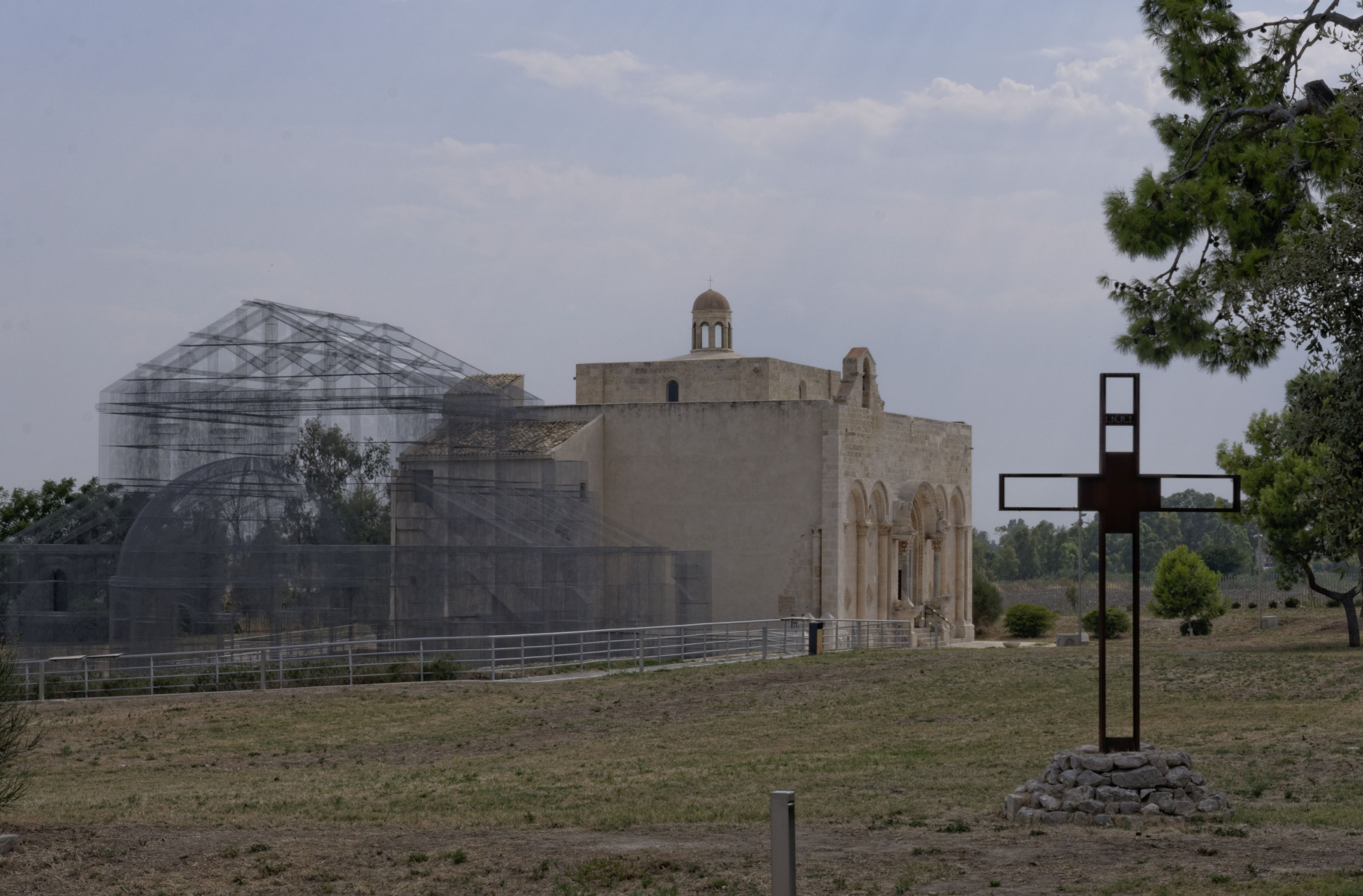 Manfredonia Santa Maria Maggiore (Siponto) 2017